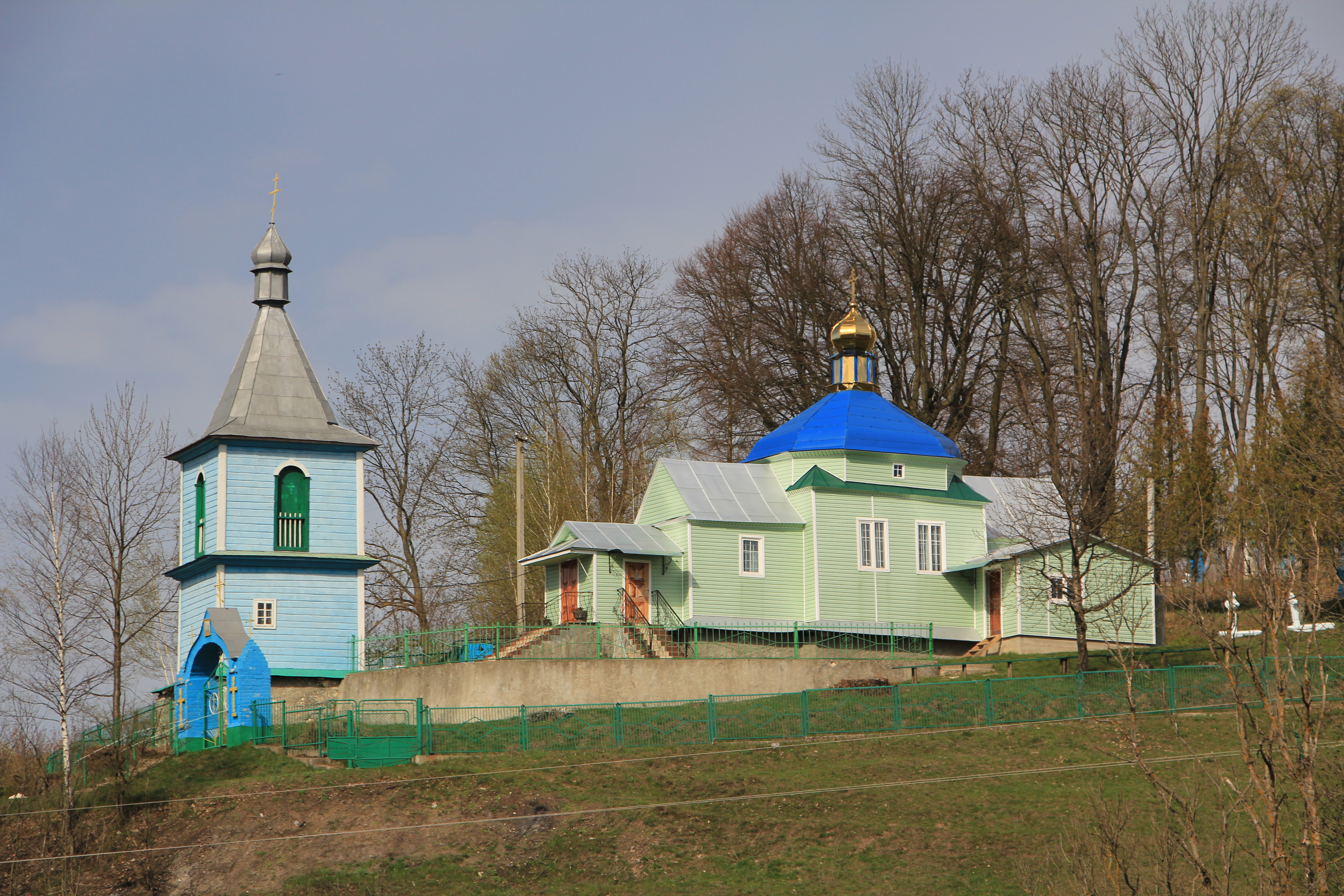 Дерев'яна церква в селі Хотовиця Кременецького району Тернопільської області